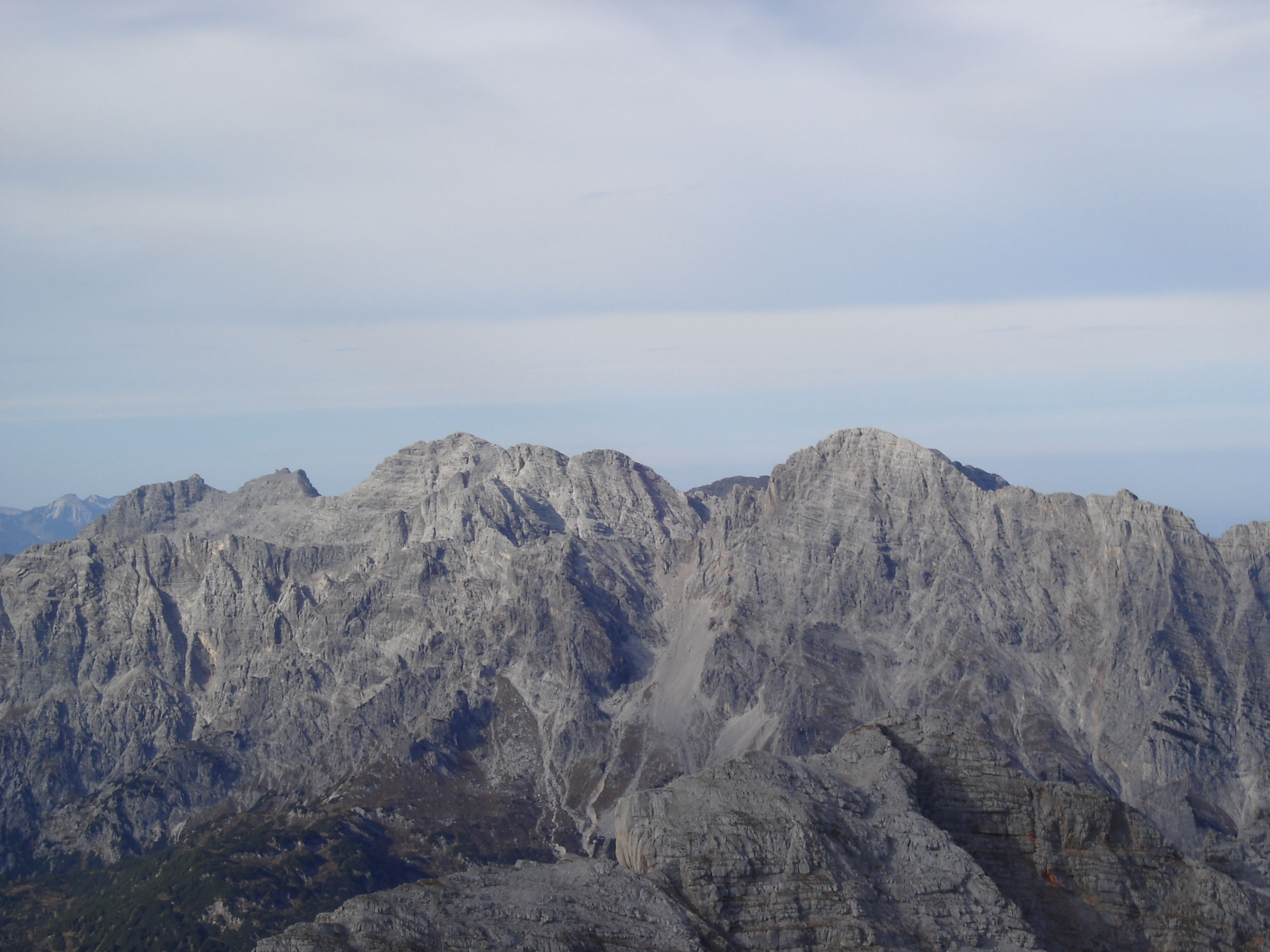 description: Loferer Steinberge von Süden(Gipfel Birnhorn) Source: eigene Aufnahme created: 2005-11-4